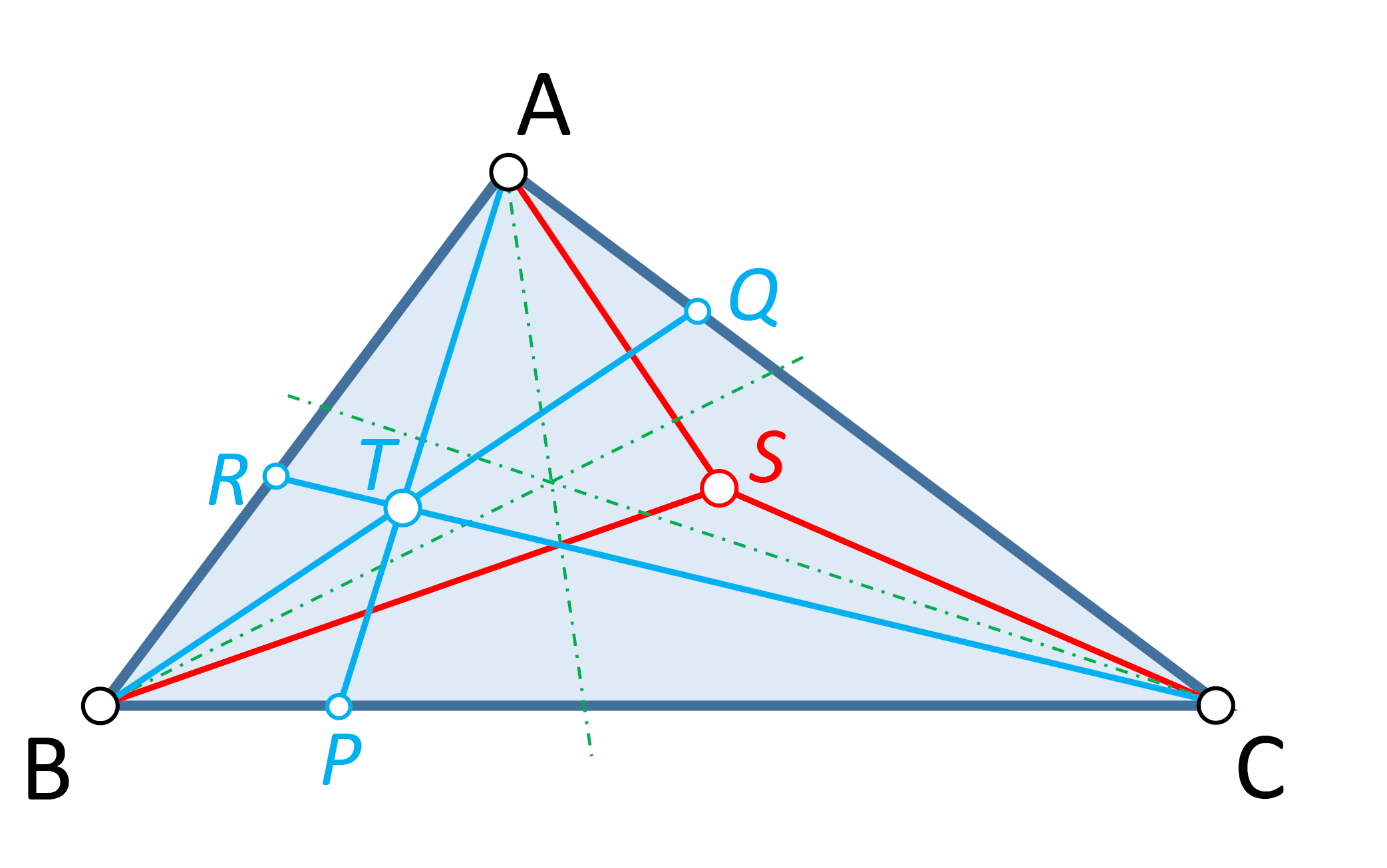 Si tres rectas que pasan por los vértices de un triángulo concurren en un punto, sus simedianas también lo hacen